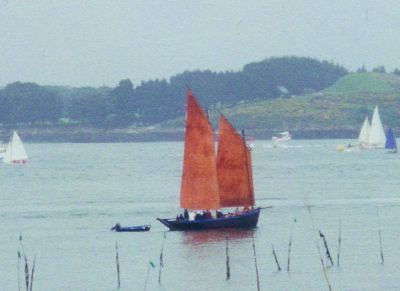 Un sinagot sur le golfe du Morbihan - photo personnelle prise en 1993